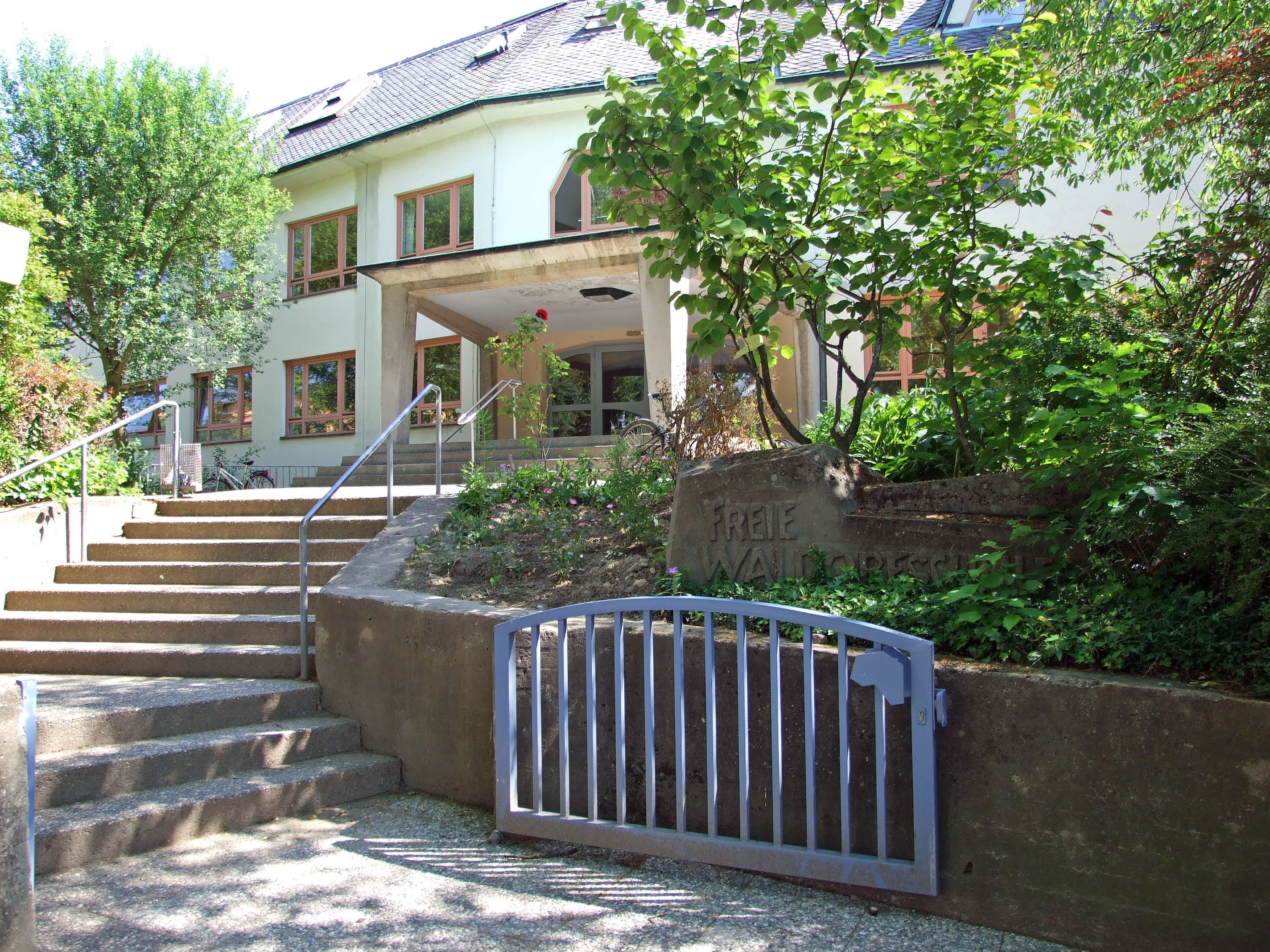 Haupteingang „Freie Waldorfschule“, Ffm, Friedlebenstrasse